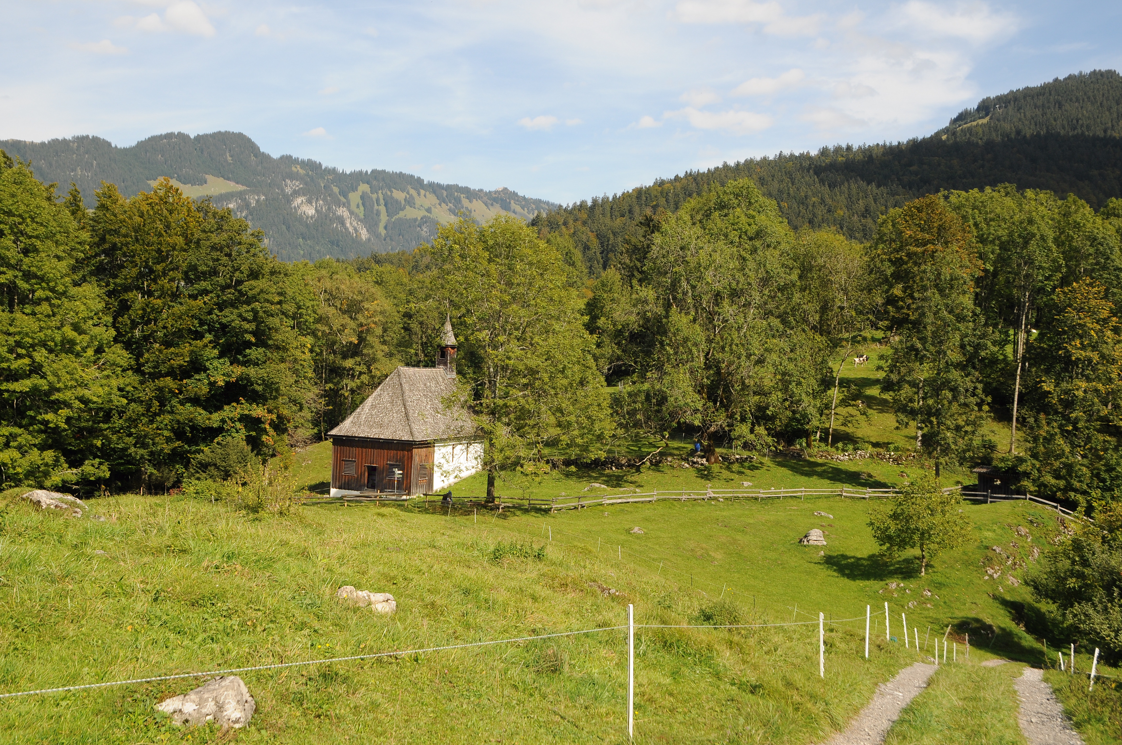 Kapelle hl. Wendelin auf der Schnepfegg in Schnepfau.